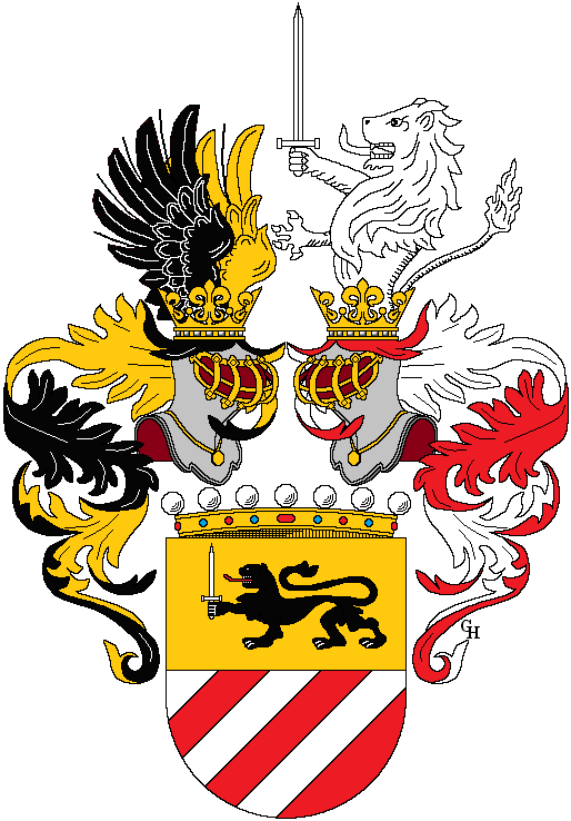 Wappen des österreichisch-ungarischen Generals der Infanterie Vinzenz Freiherrn von Fox (1859–1931), verliehen anlässlich seiner Erhebung in den österreichischen Freiherrenstand 1918. Zeichnung von Gerd Hruška ( Für weitere Informationen zu dieser Standeserhebung siehe (